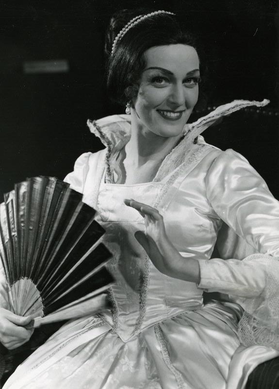 Brita Billsten i Trettondagsafton på Helsingborgs stadsteater